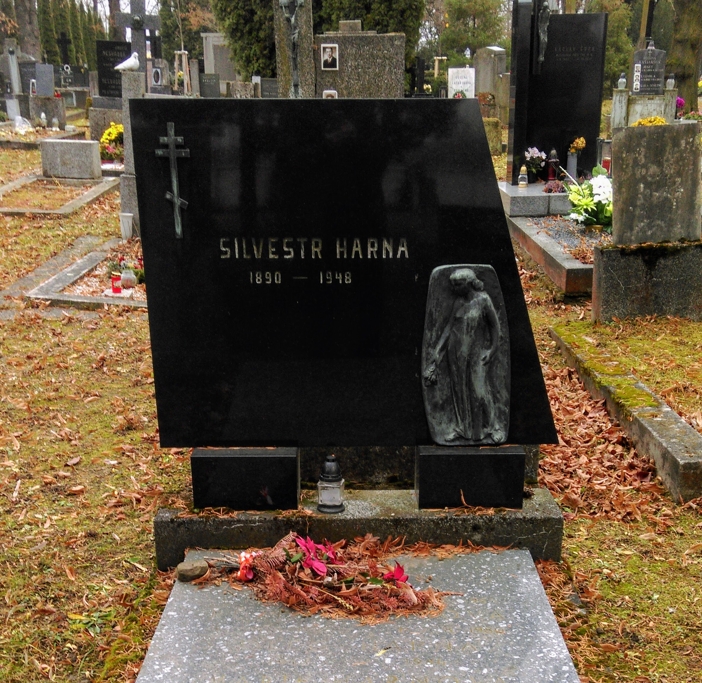 Hrob Sylvestra Harny, legionářského výtvarníka, sochaře a pedagoga.